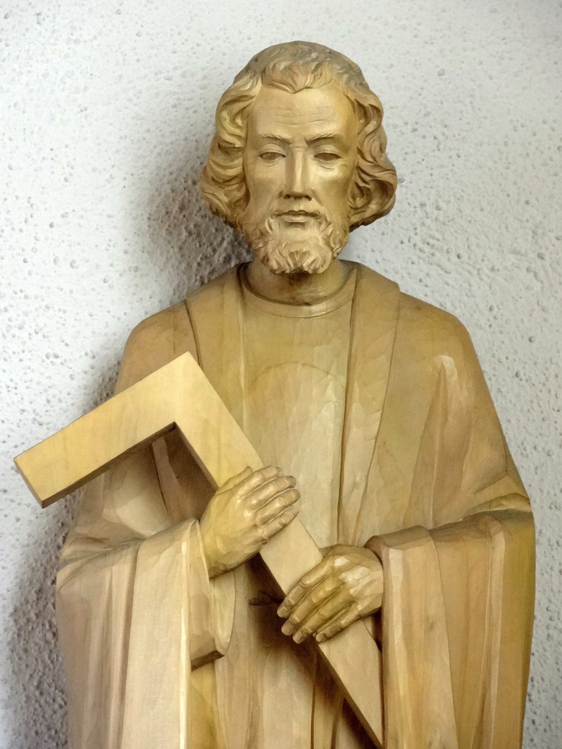 St. Josef Lang-Göns